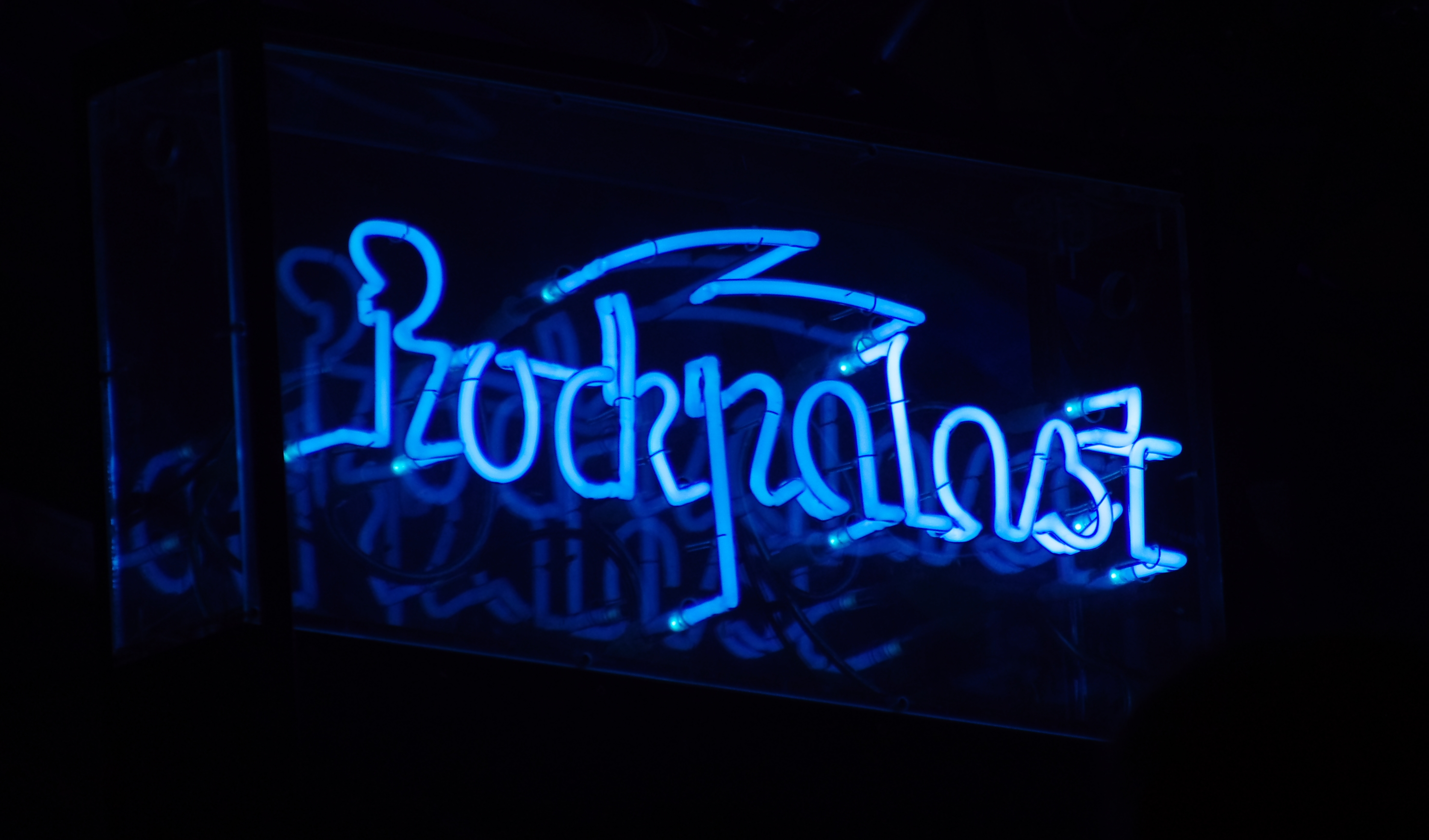 WDR Rockpalast Logo auf dem Haldern Pop Festival 2013. Hauptbühne